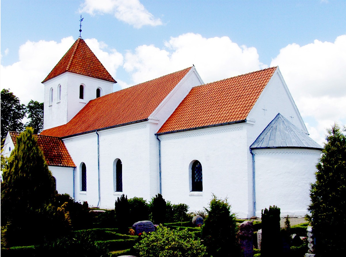 fra sydøst